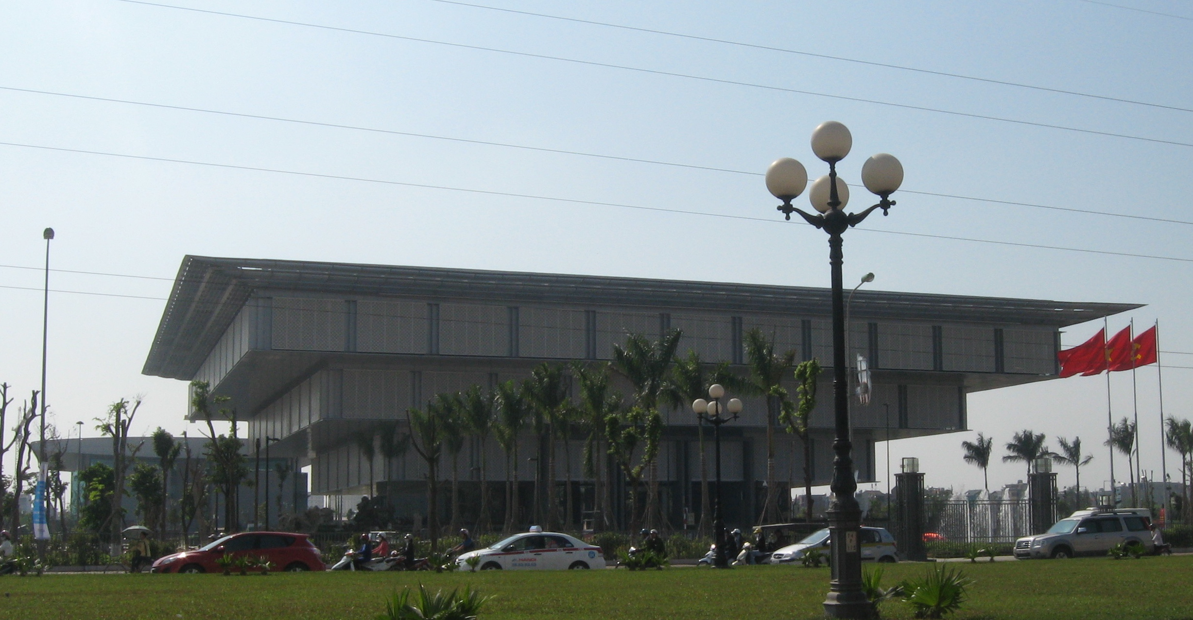 Hanoi Museum, Hanoi, Vietnam